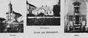 Кірха, бyдинок протестанського священика і вівтар кірхи